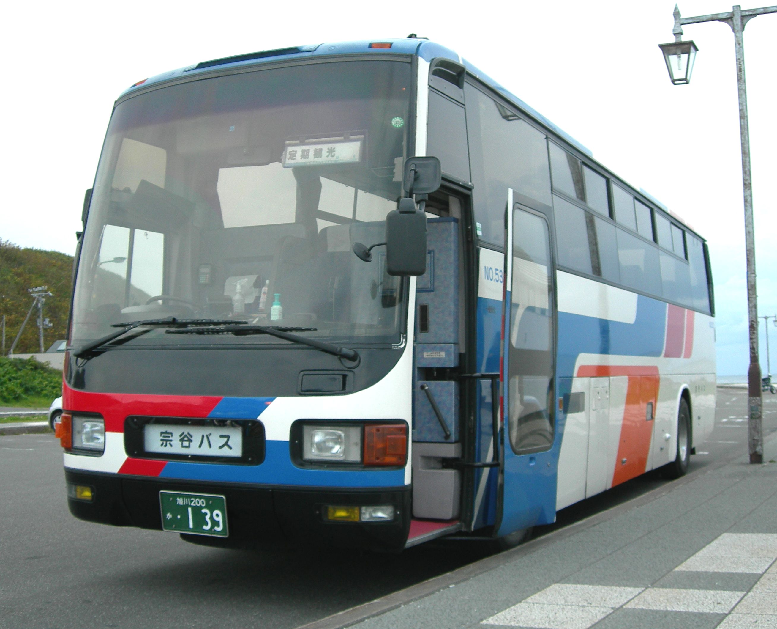 Sōya Bus, Wakkanai sightseeing bus 宗谷バス 定期観光バス